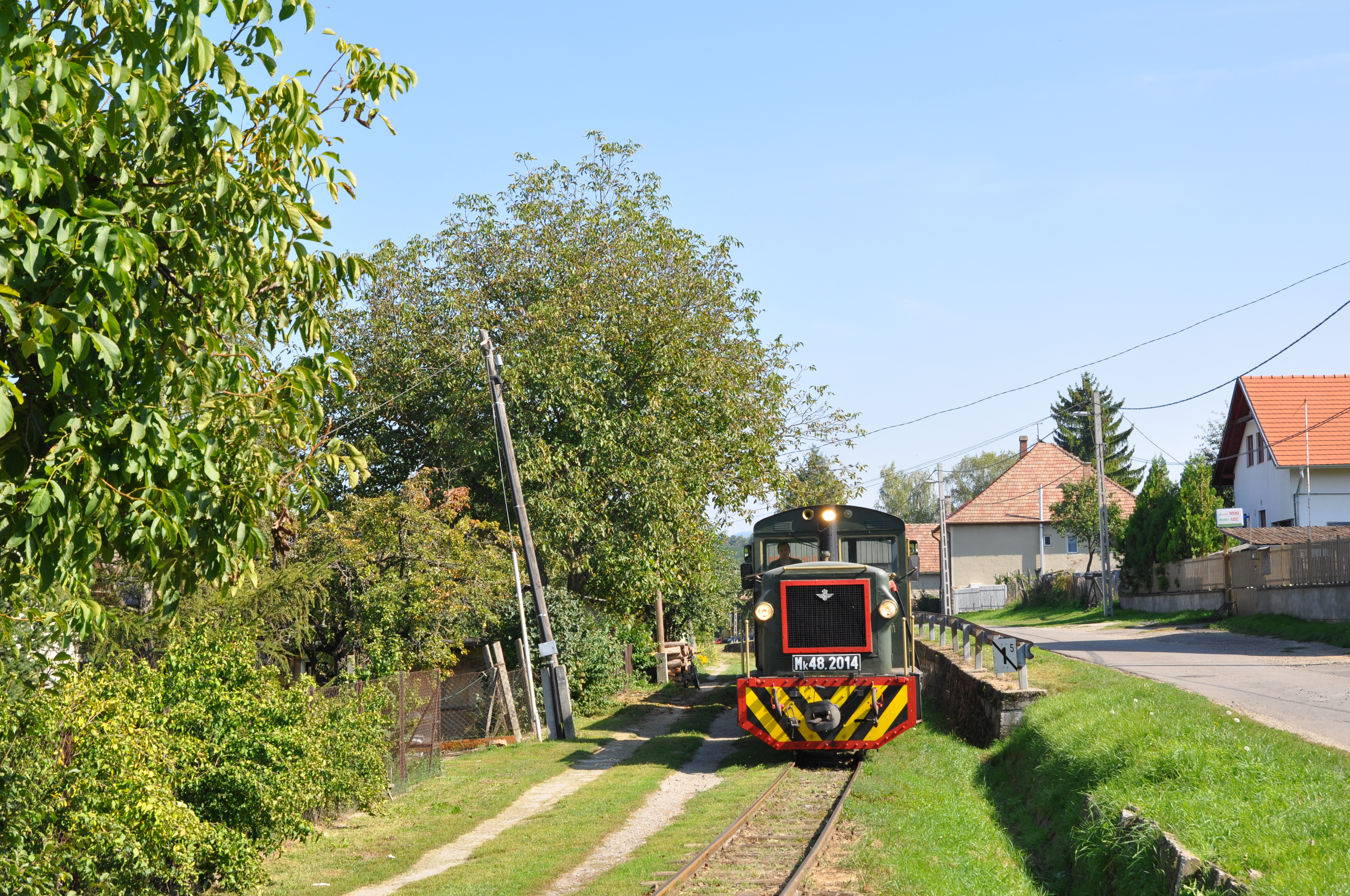 Szokolya